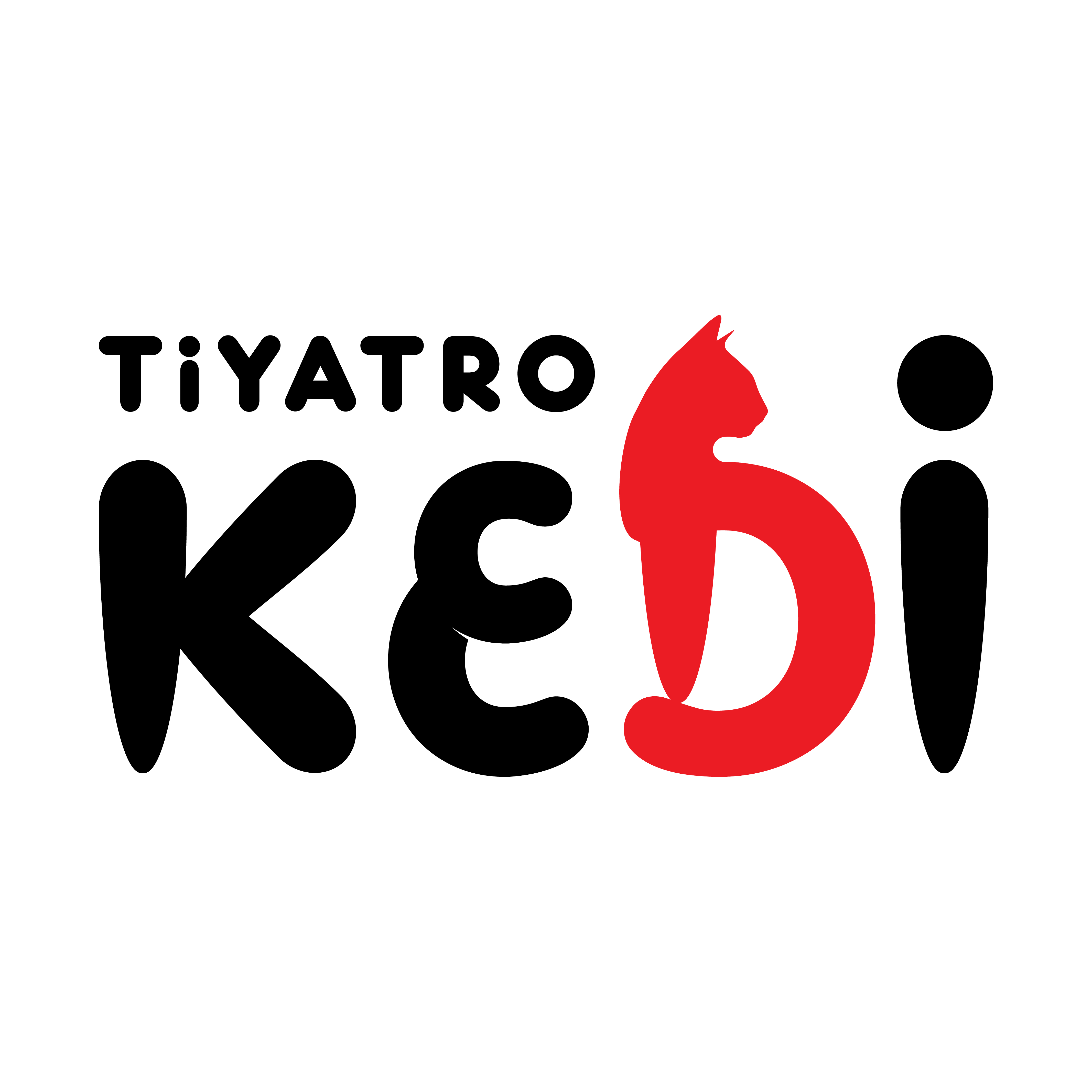 Tiyatro Kedi logosu